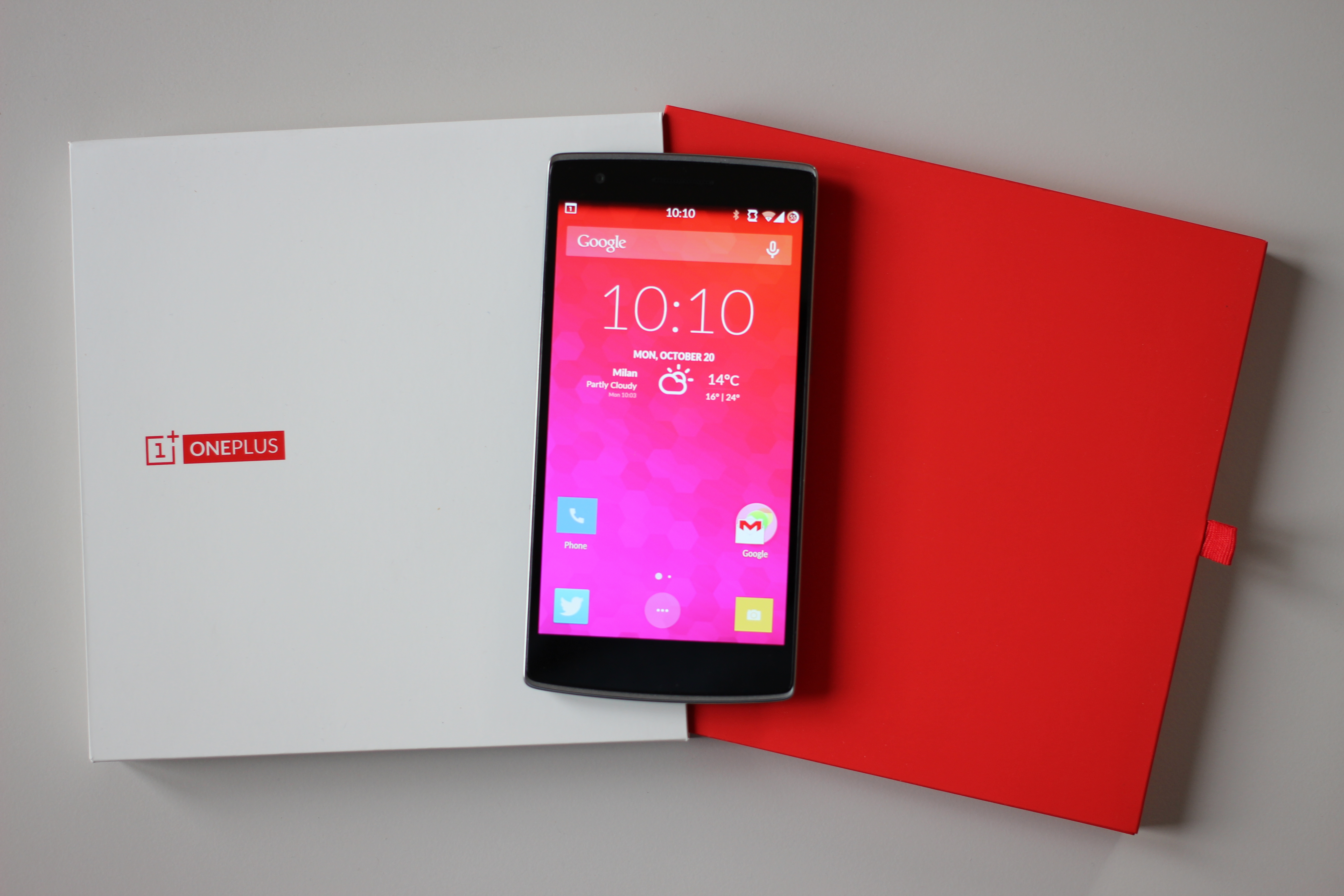 OnePlus One